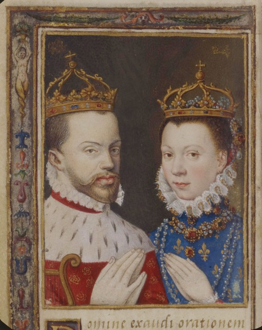 Miniatura estratta da un libro di preghiere di Caterina de' Medici, raffigurante Filippo II di Spagna ed Elisabetta di Valois, sua terza moglie.